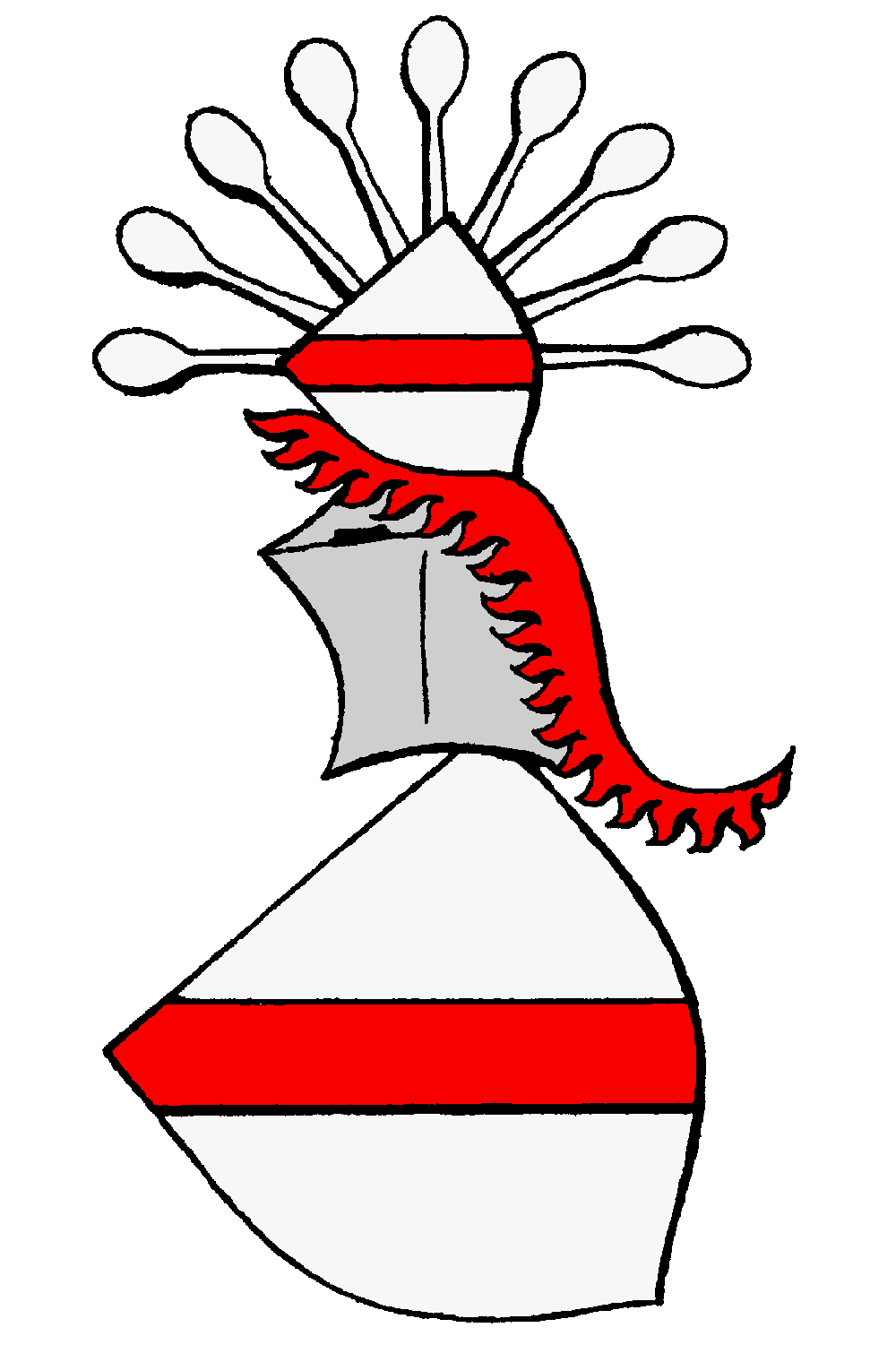 Stammwappen der von Lepel auf Grabstein in Teterin